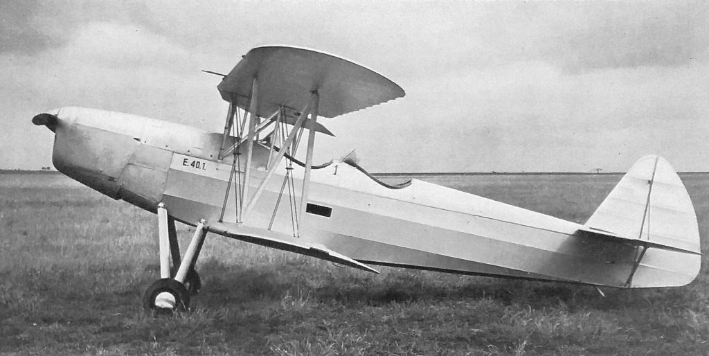 Walter Minor 4 a Praga E-40.1 (1937)